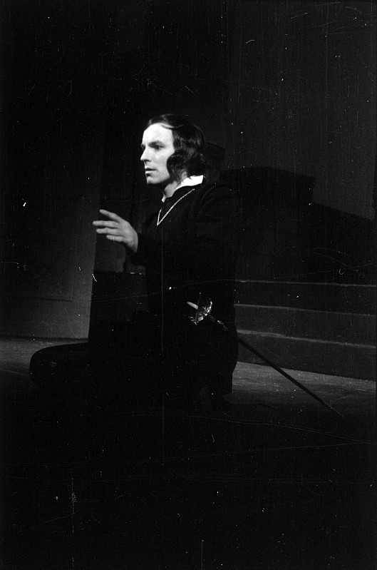 Original image description from the Deutsche FotothekHorst Caspar in der Titelrolle, Walter Richter als Claudius, Gerda Müller als Gertrude und Agathe Poschmann als Ophelia